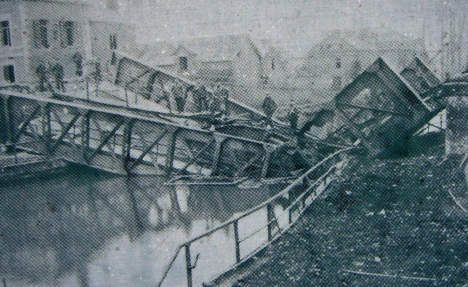 Masniéres pont sur l'Escaut